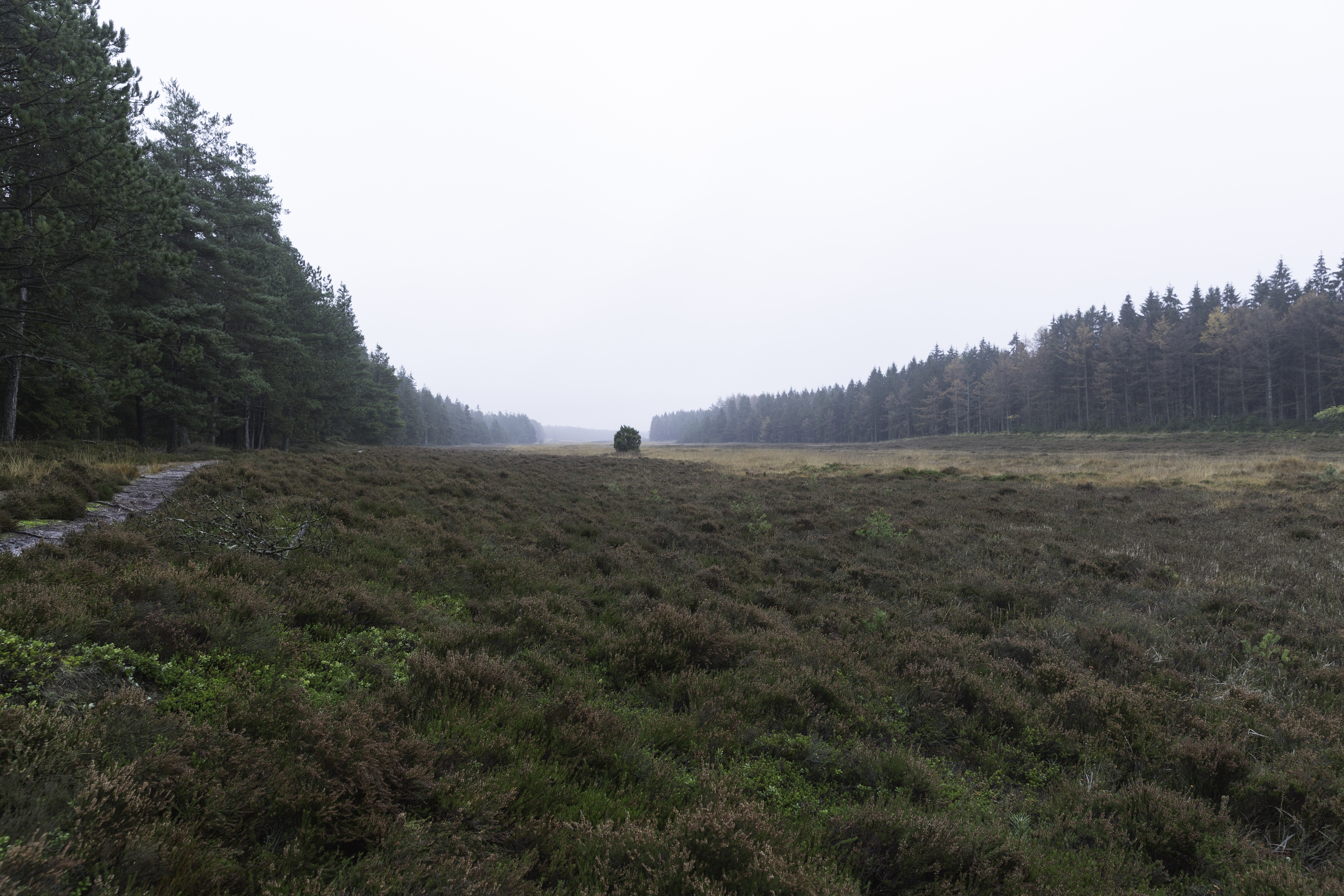 smeltevandsdalen, Kompedal